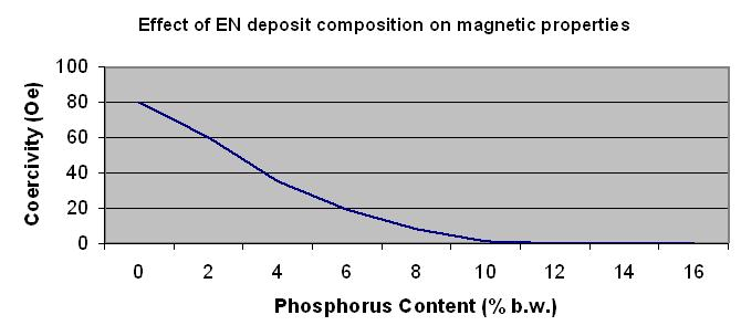 schéma electroless nickel